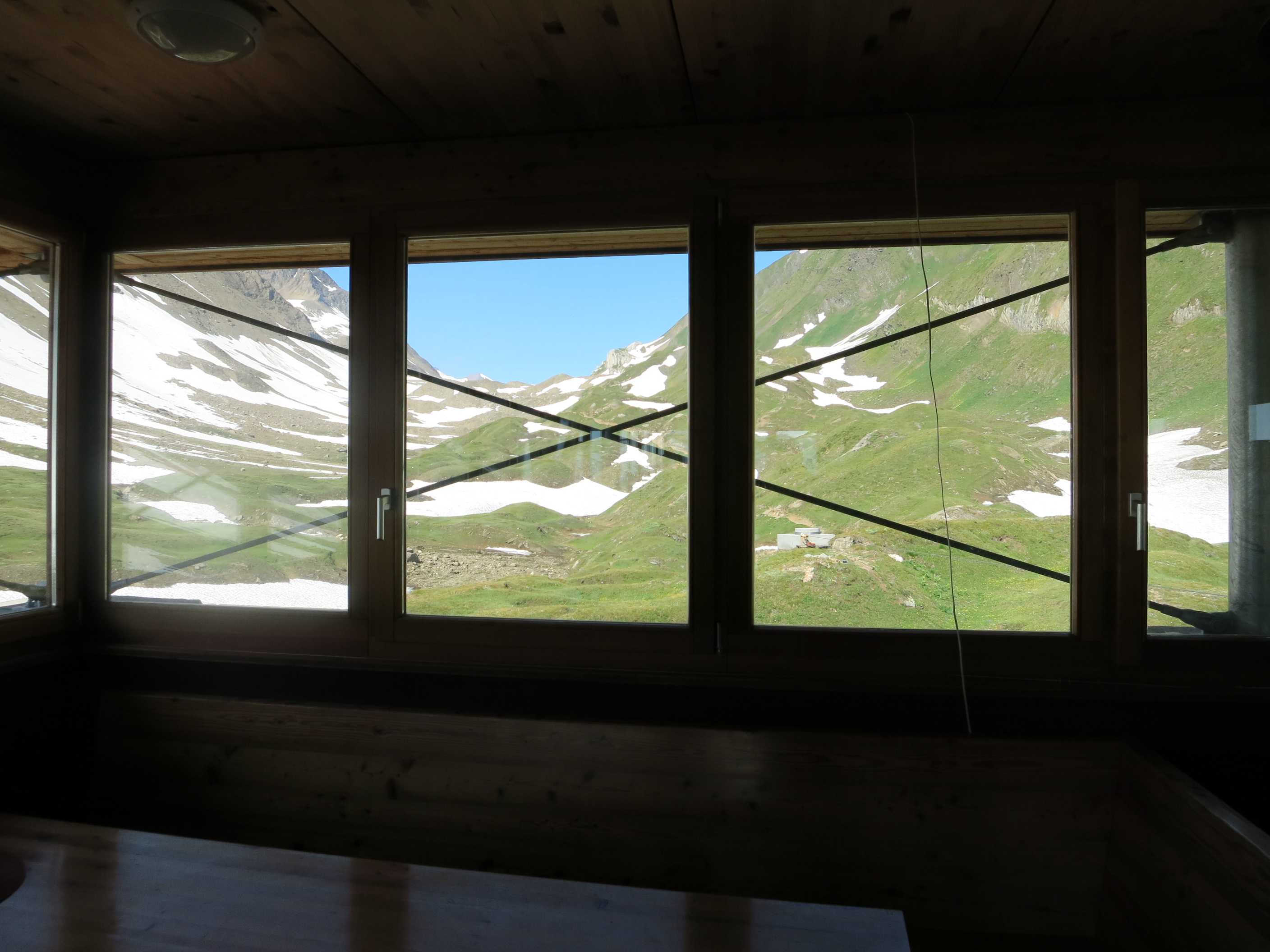 Corno Gries Hütte, Bedretto TI, Schweiz